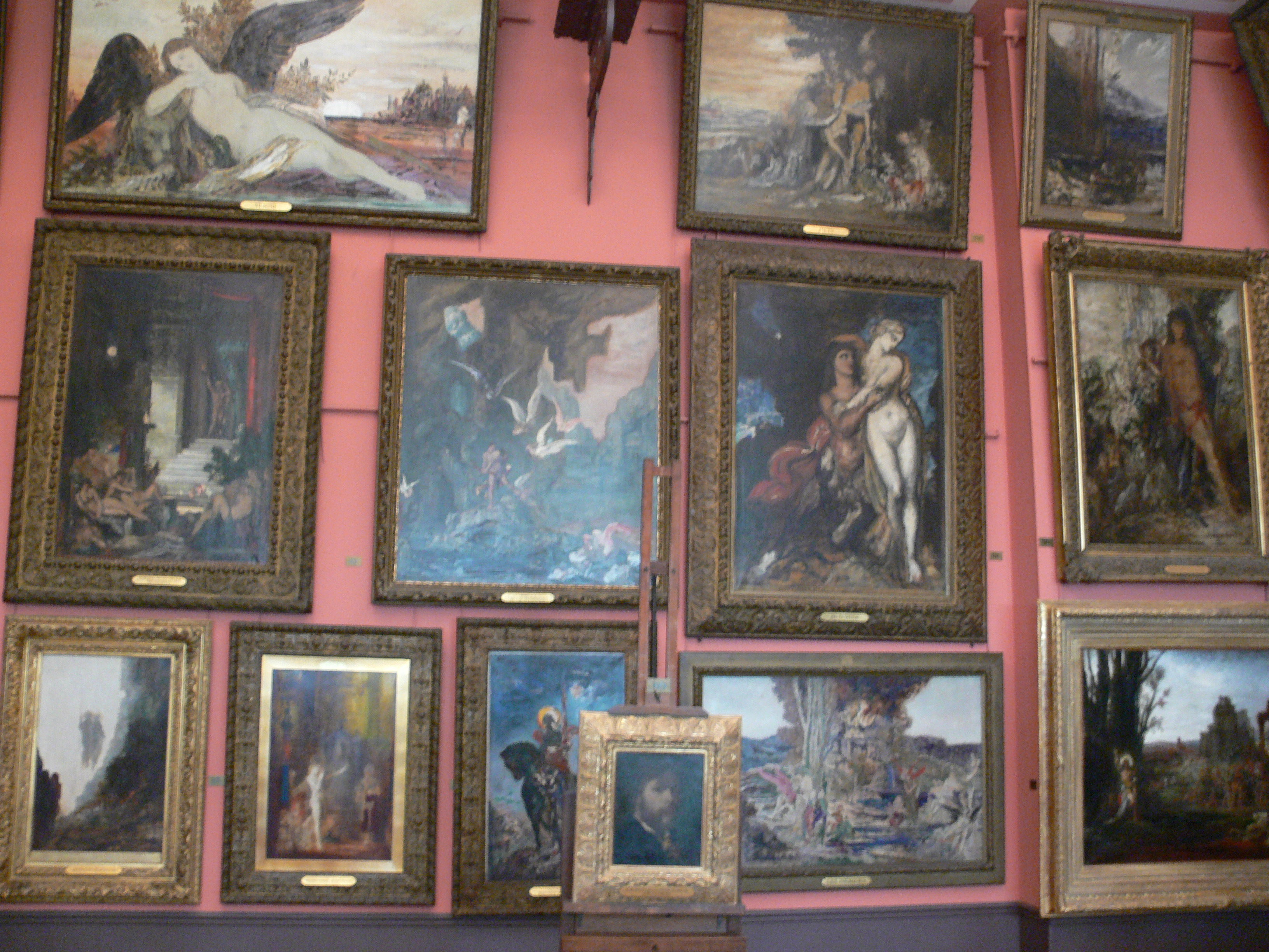 Musée national Gustave-Moreau, Paris